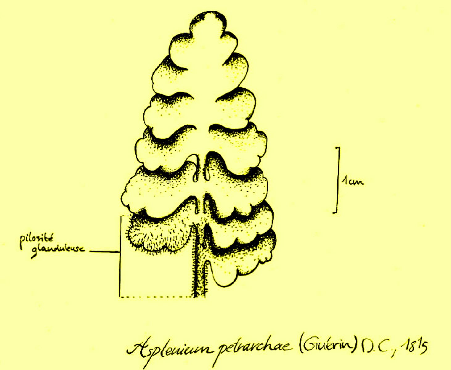 Asplenium petrarchae de Fontaine de Vaucluse dessin de Guérin 1815